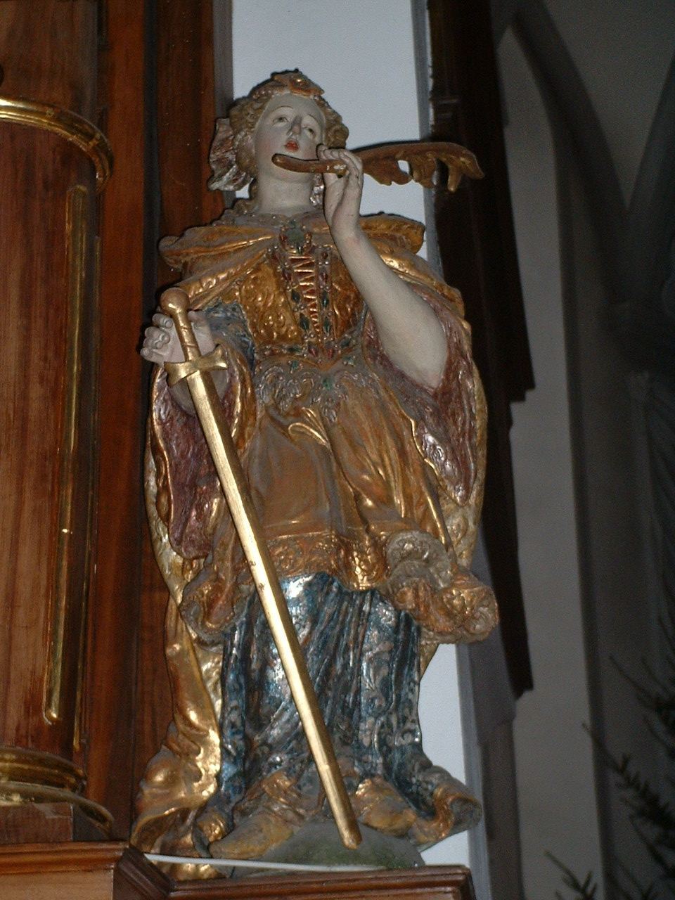 Söflingen Abbey, church interior, statue